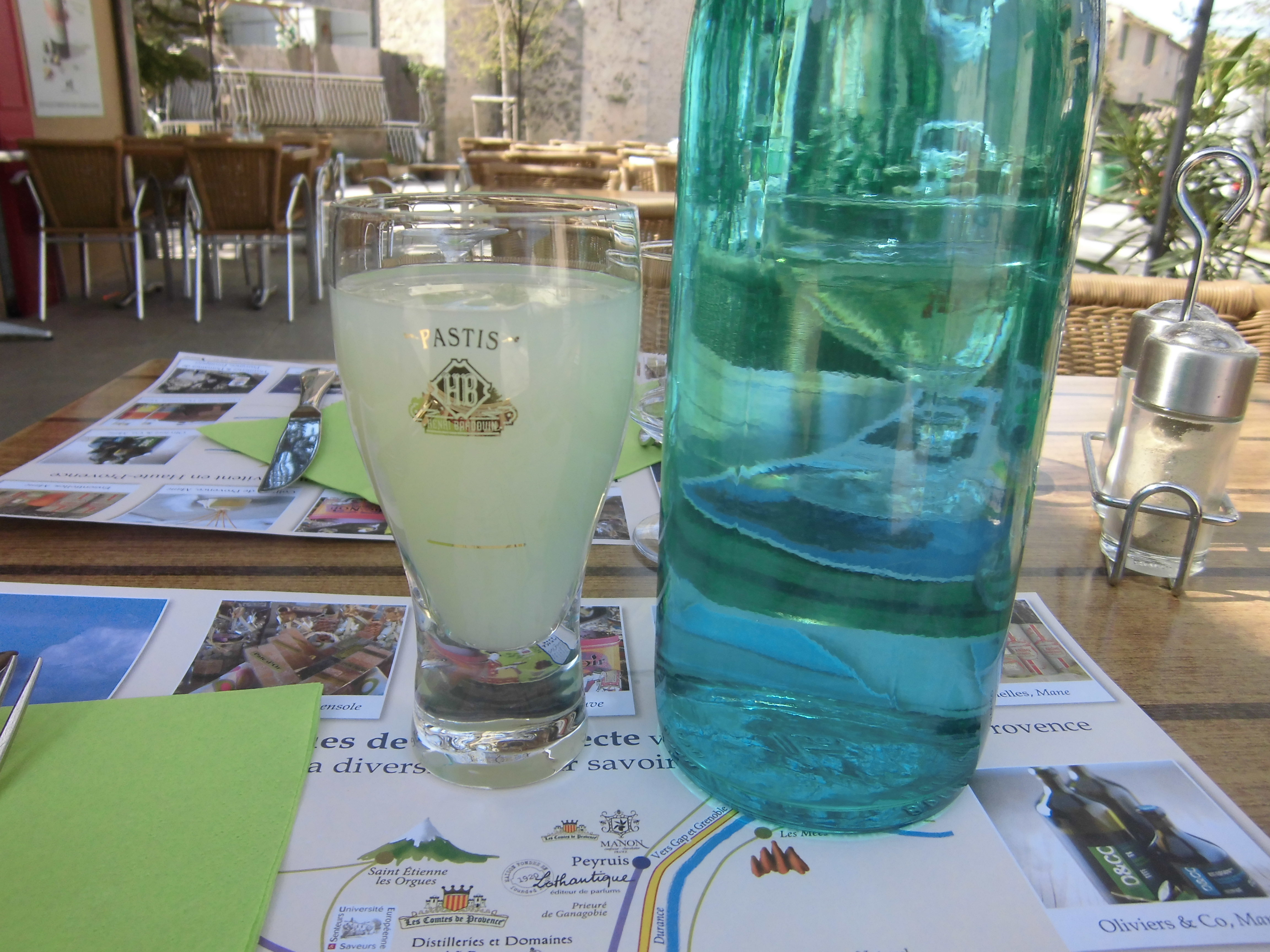 pastis Banouin au Bistrot de Pays de Niozelles